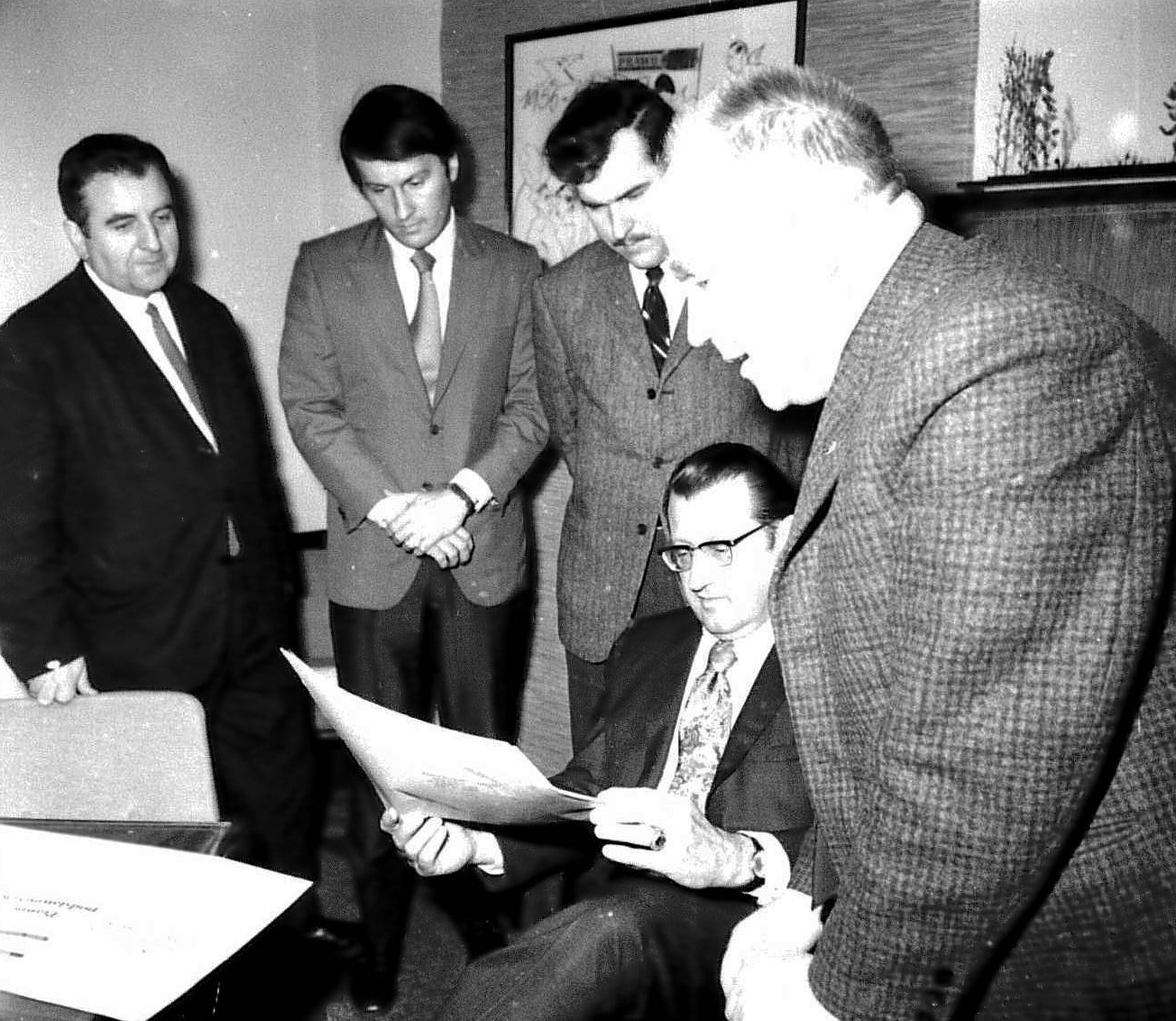 E.J.Piszek w asyscie syna Ed'a, Red.R.Strybla i Płk. Z. Ciesiołkiewicza, na spotkaniu z redaktorem Prawo i Życie w Warszawie, Kazimierzem Kąkol w styczniu 1971, później Sekretarzem KC PZPR. English Translation - E.J.Piszek (sitting) in the assistance of his son Ed, translator Robert Strybel and Colonel Z.Ciesiołkiewicz, at the meeting with the editor of Prawo i Życie in Warsaw, Kazimierz Kąkol, in January 1971, later on a Secretary of the KC PZPR.